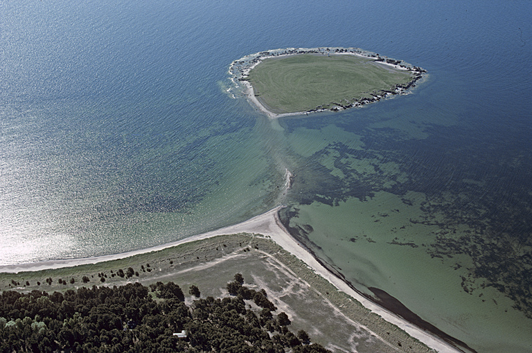 Bilden troligen från 1980-talets början. Motiv: Heligholmen Nyckelord: Flygbilder, Riksintressen Kategori: Kust- och skärgårdsmiljöBilden troligen från 1980-talets början.